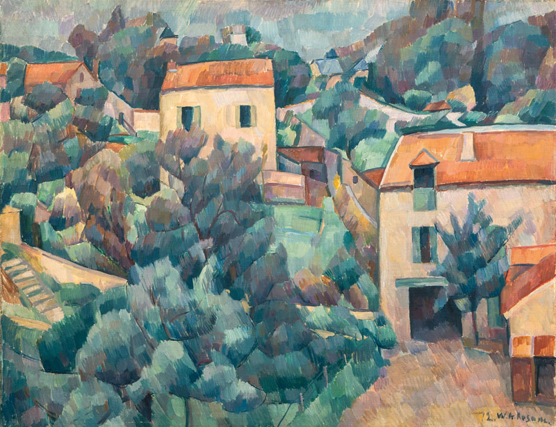 Dorf in Frankreich (Hardricourt?), Öl/Lw., 60 x 72,5 cm, r. u. dat. u. sign. 12 W. A. Rosam